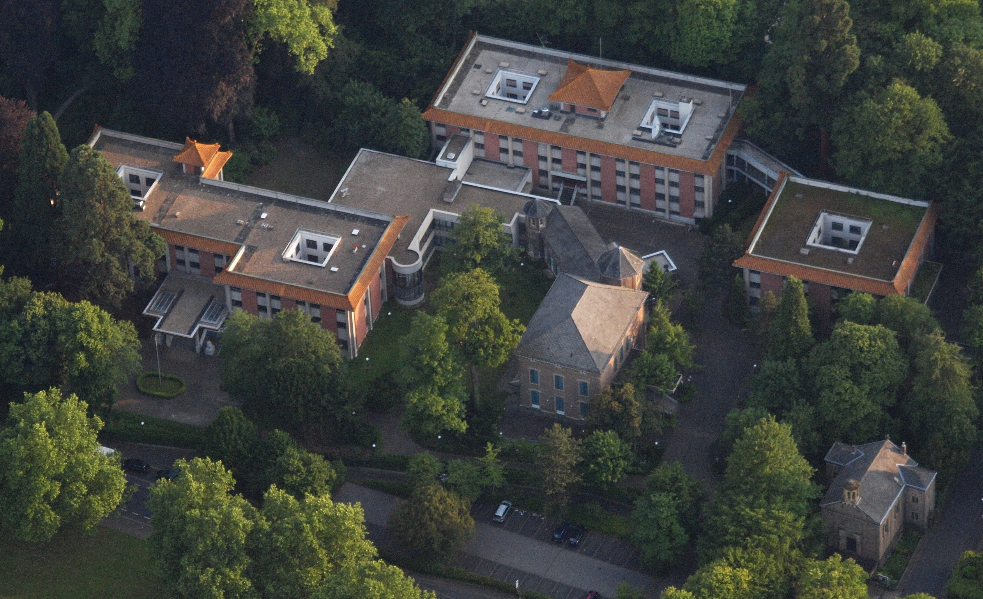 Ehemaliges Kanzlei- und Residenzgebäude der Botschaft der Volksrepublik China, Kurfürstenallee 12/Friedrich-Ebert-Straße 59, Bad Godesberg: Luftaufnahme